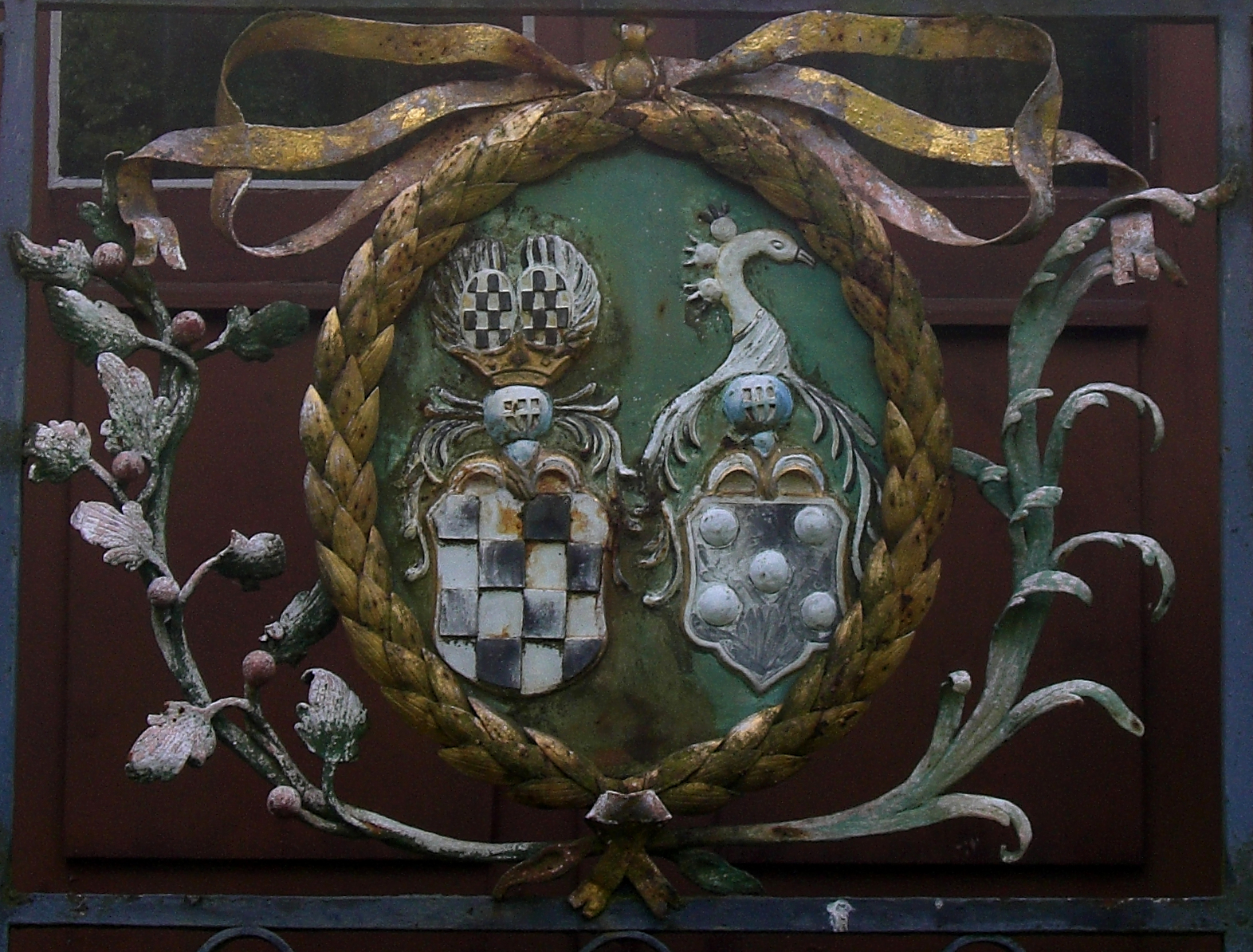 Wappen über dem hinteren Seiteneingang Kirche Kartause Freiburg; Allianzwappen Baden-Mannsberg und Sickingen